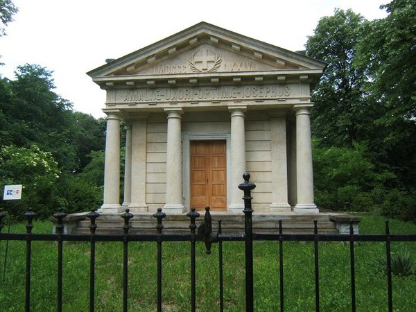 A kaposújlaki Somssich-mauzóleum. This is a photo of a monument in Hungary, Identifier: 7908